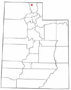 Localización de Amalga, Utah.